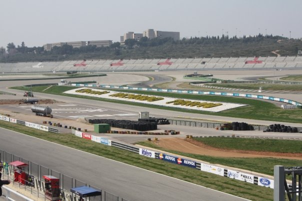 Circuit de la Comunitat Valenciana Ricardo Tormo en Cheste, Comunidad Valenciana, España (2011).